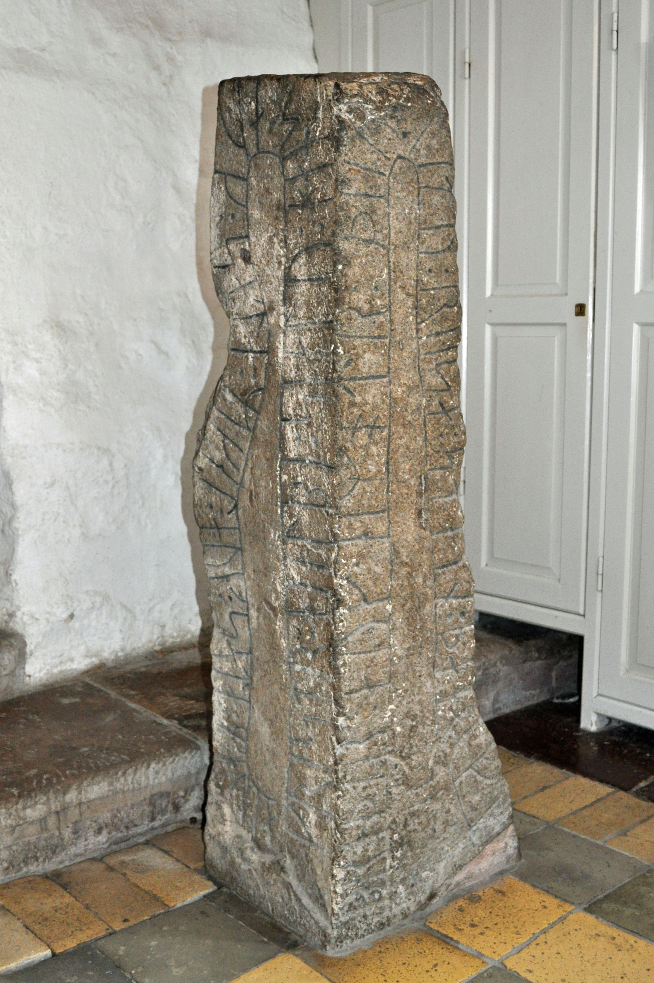 Østerlars Kirche, Bornholm (2012-07-06), by KLugschnacker in Wikipedia (10)